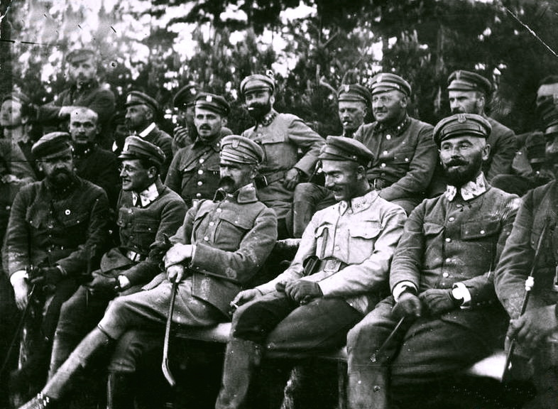 Беларуская (тарашкевіца): Легіёны на ўсходнім фронце - Юзэф Пілсудзкі (у першым радзе трэці з права) са штабам ў ваколіцах Маладэчна, таксама на здымку падпалкоўнік Эдвард Рыдз-Сьміглы (у першым радзе пяты зьлева) і маёр Станіслаў Бургардт-Букацкі .